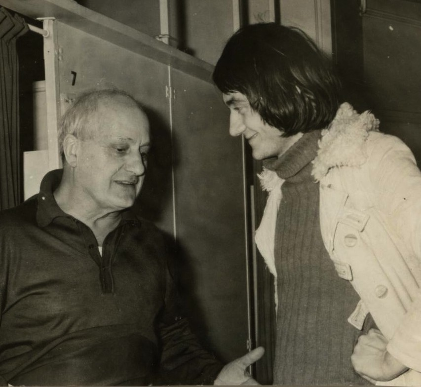 Photo prise à l'occasion du spectacle de Jean Dasté à la maison de la culture de Bourges. Dans la loge du comédien avec Alain Meilland